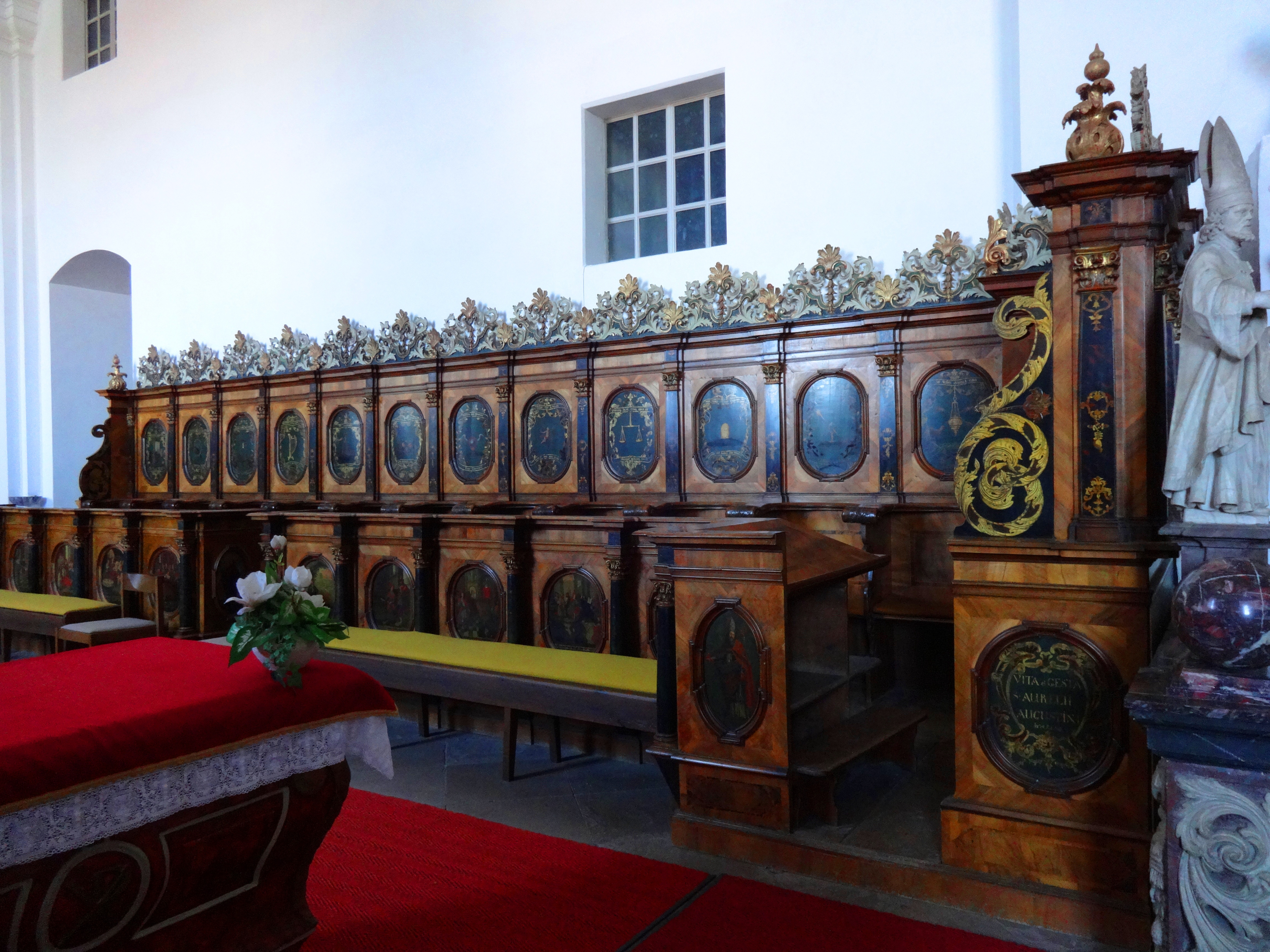 Goslar-Grauhof, St. Georg, Chorgestühl